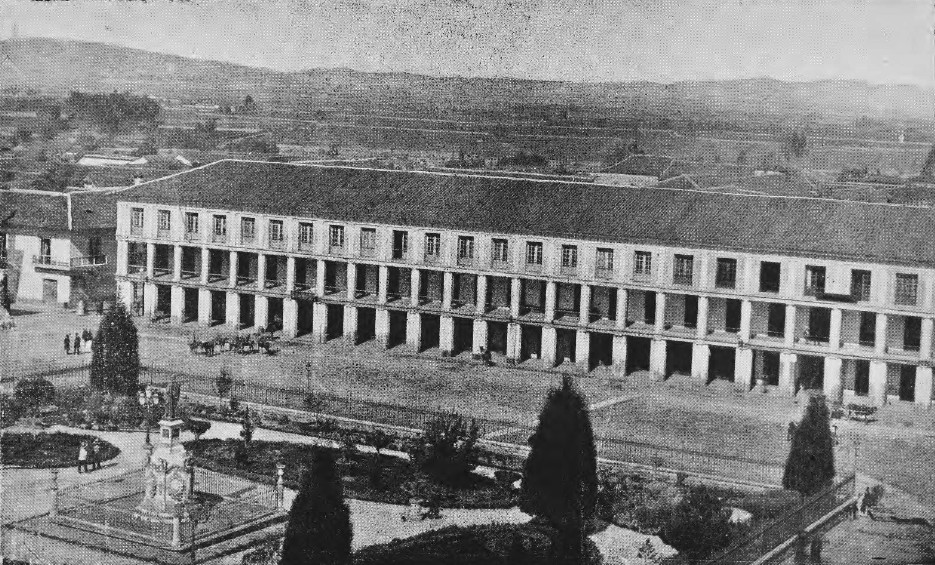 Bogota, view of Sabana